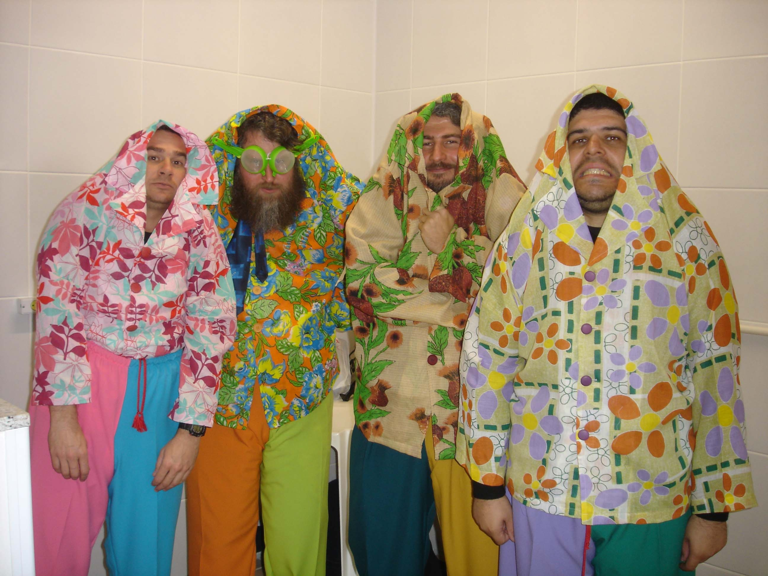 Repolho Vol.4